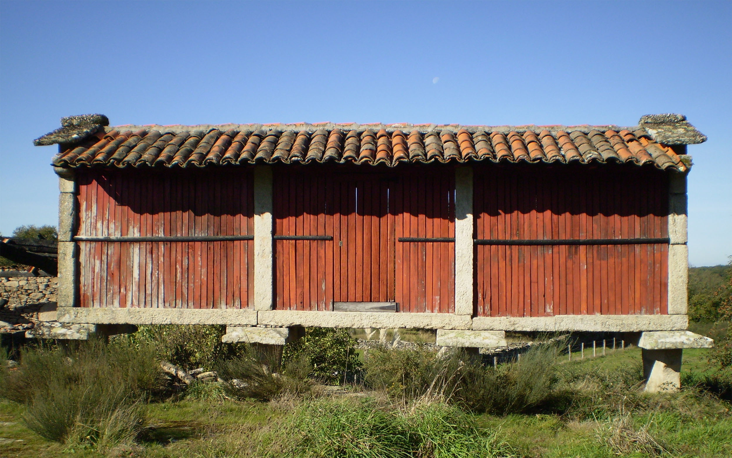 Hórreo tipo mahía, de tres claros con catro cepas transversais, cada unha das cales leva unha ménsula nas que se asenta a base